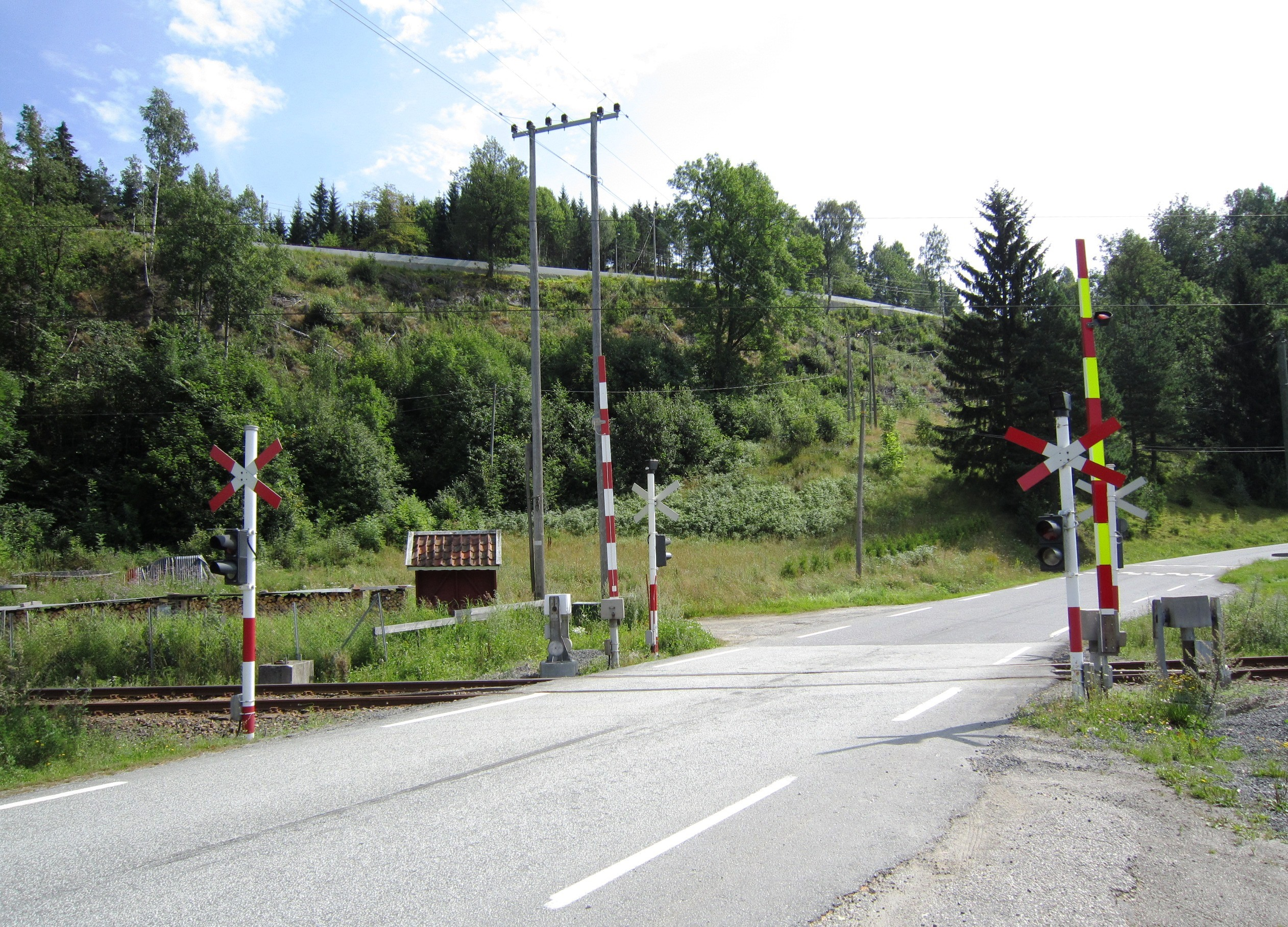 Fylkesvei 408 krysser Arendalsbanen ved Blakstad.